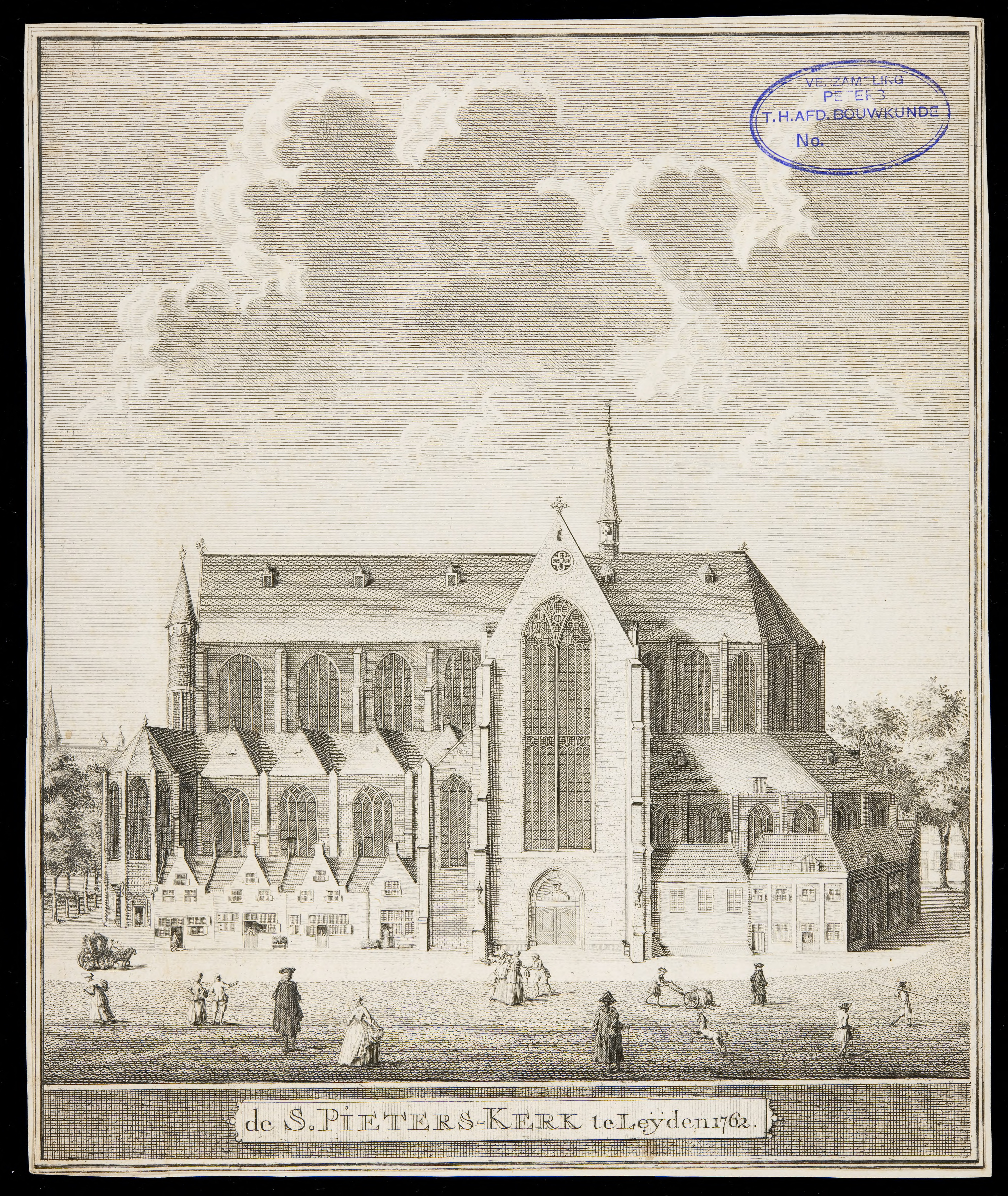 De Sint-Pieterskerk te Leiden naar de situatie van 1762. Mogelijk afkomstig uit: F. van Mieris, Beschryving der stad Leyden, haare gelegenheid, oorsprong, vergrootinge, etc., deel 1, Leyden, Wed. A. Honkoop & C. van Hoogeveen Jr., 1762, deel 2, idem, 1784; deel 3, bewerkt en aangevuld door D. van Alphen: Leyden, C. Heyligert & A. en J. Honkoop, 1784